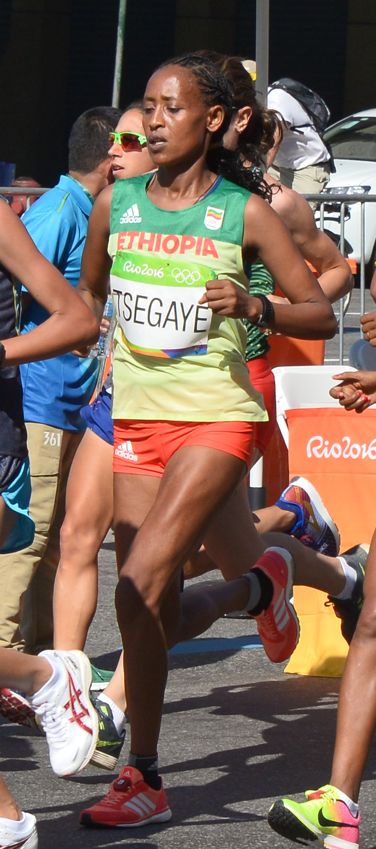 Passage du marathon des jeux olympiques de Rio 2016 dans le centre de Rio